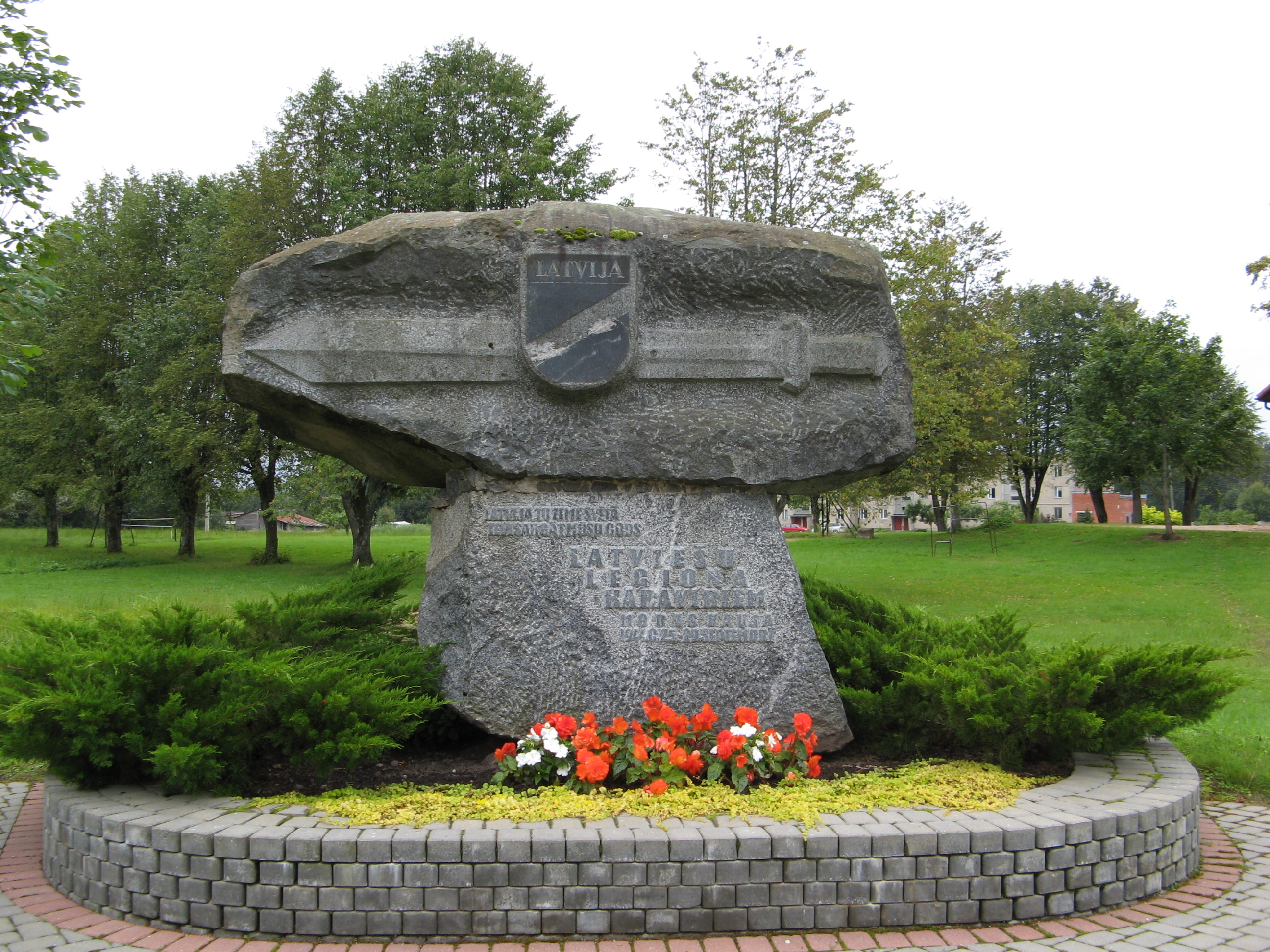 Mans foto. Dukurs (diskusija) 18:18, 15 novembrī, 2012 (UTC)